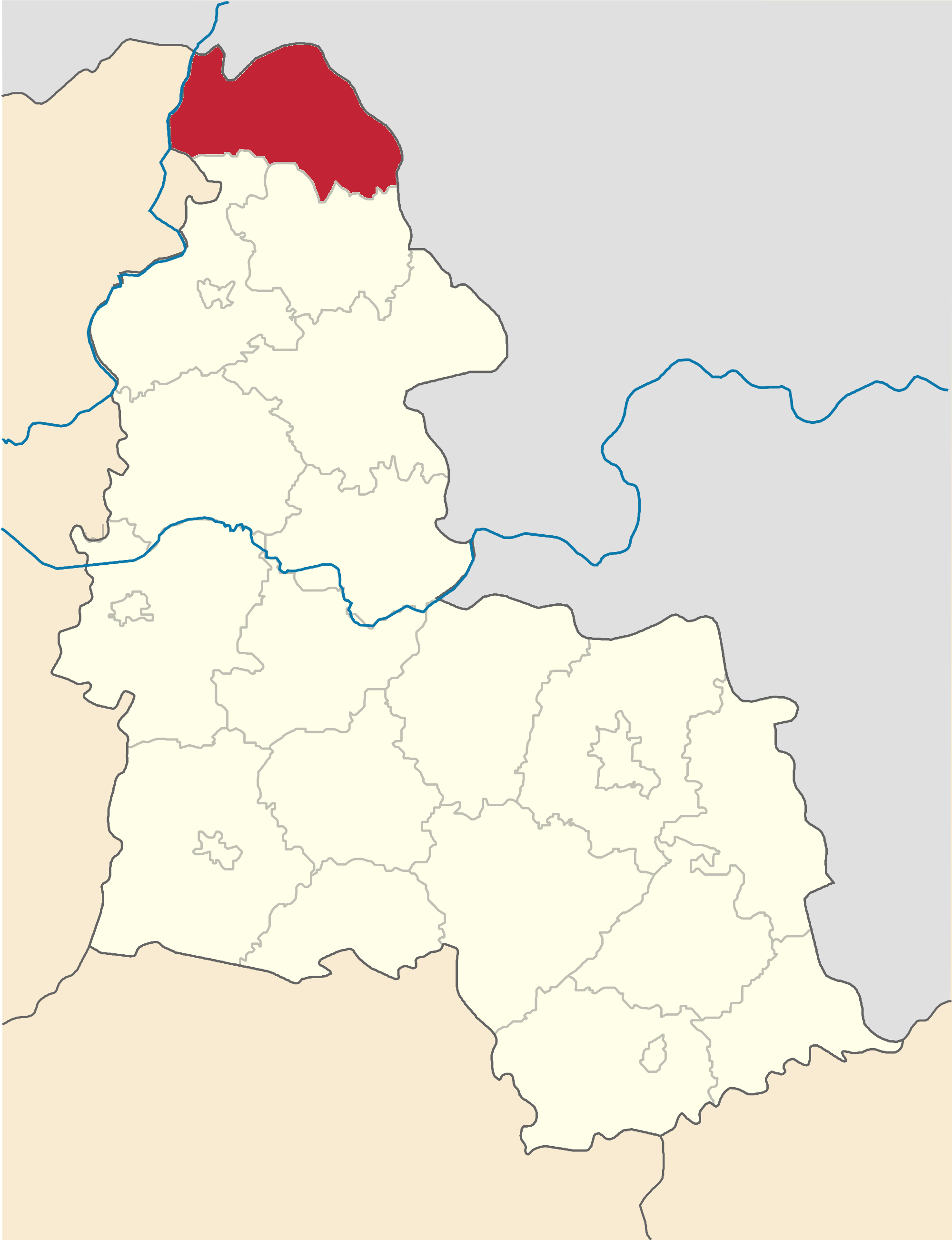 Seredynobudskyi-Raion map